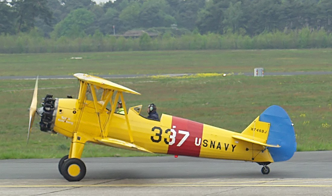 Stearman Aircraft Corporation - Boeing PT-17 Stearman (N746BJ) auf der Flugzeugshow am Airport Niederrhein während der Geburtstagsfeier zum einjährigen Bestehens des Flughafens.